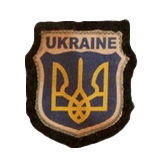 Шеврон українських національних частин у складі німецької армії 1944 рік